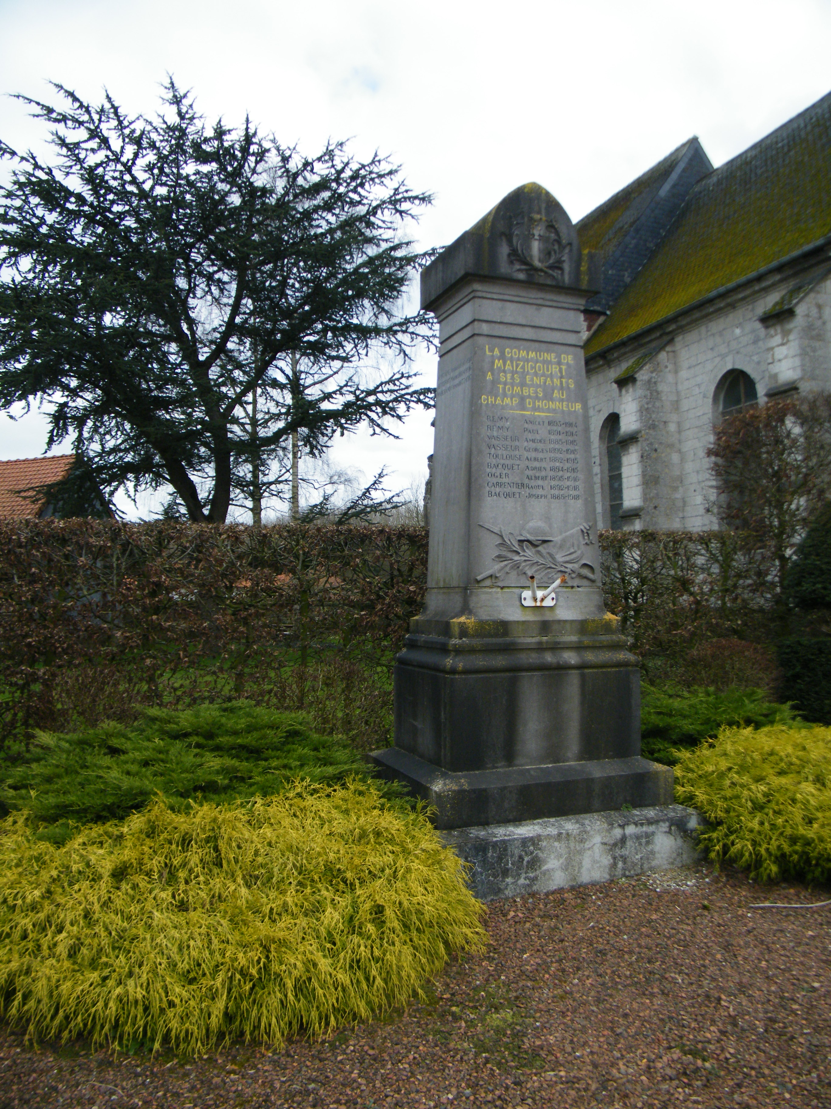 Monument